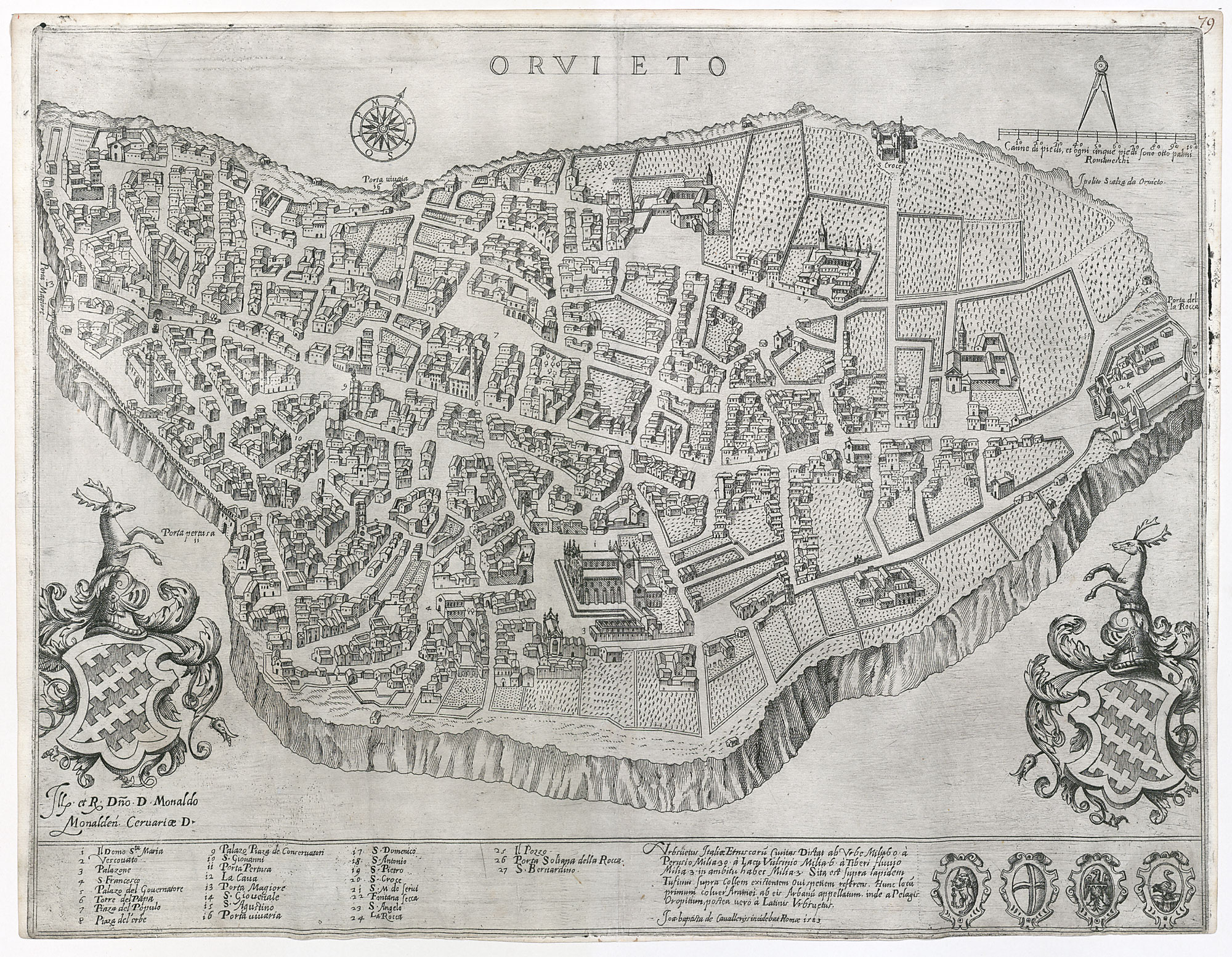 Cavalleriis, Joannes Baptista de: Ansicht von Orvieto; Kupferstich, 1583